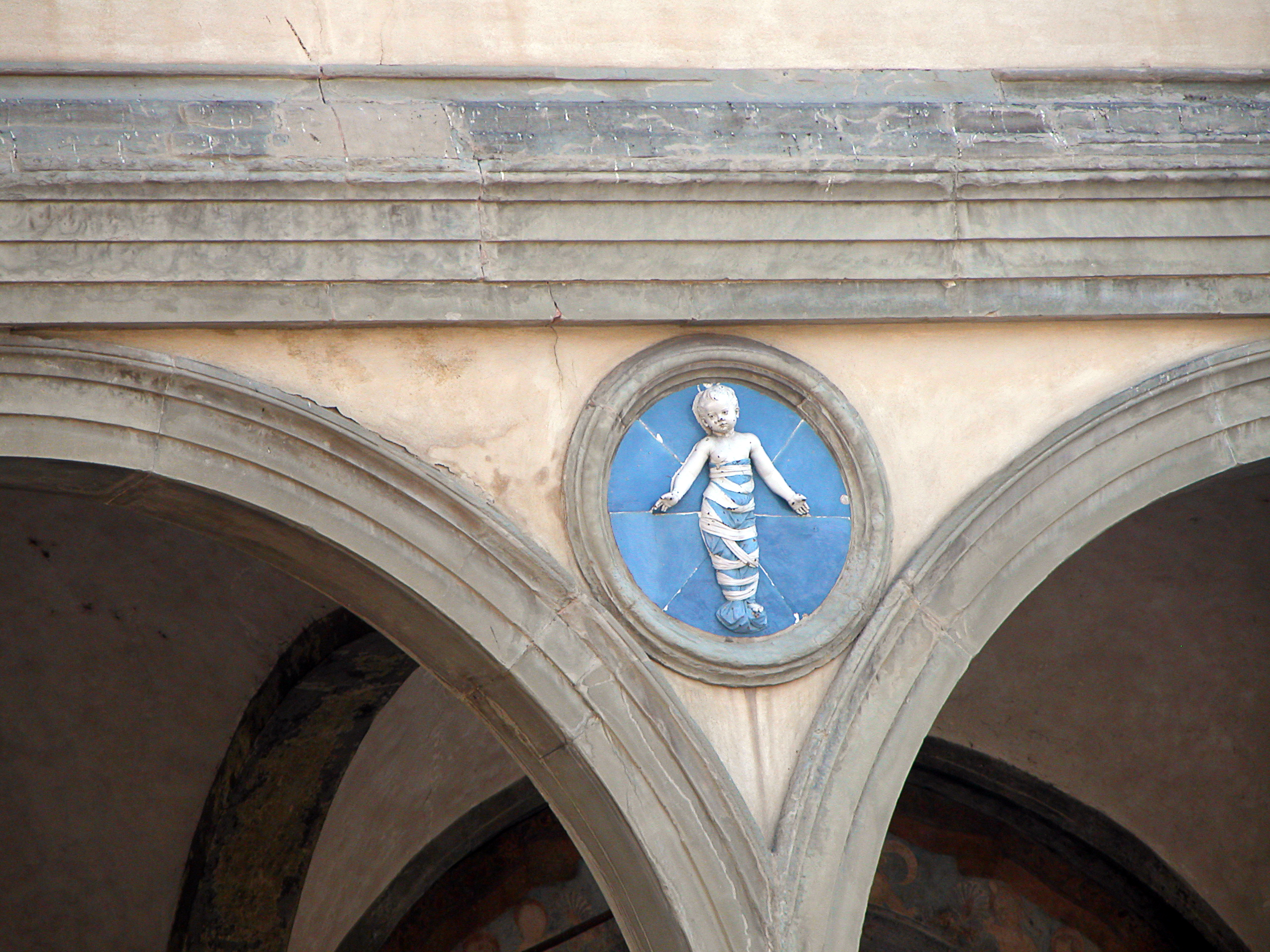 Un des médaillons de Andrea della Robbia sur la façade de l'Hopital des Innocents